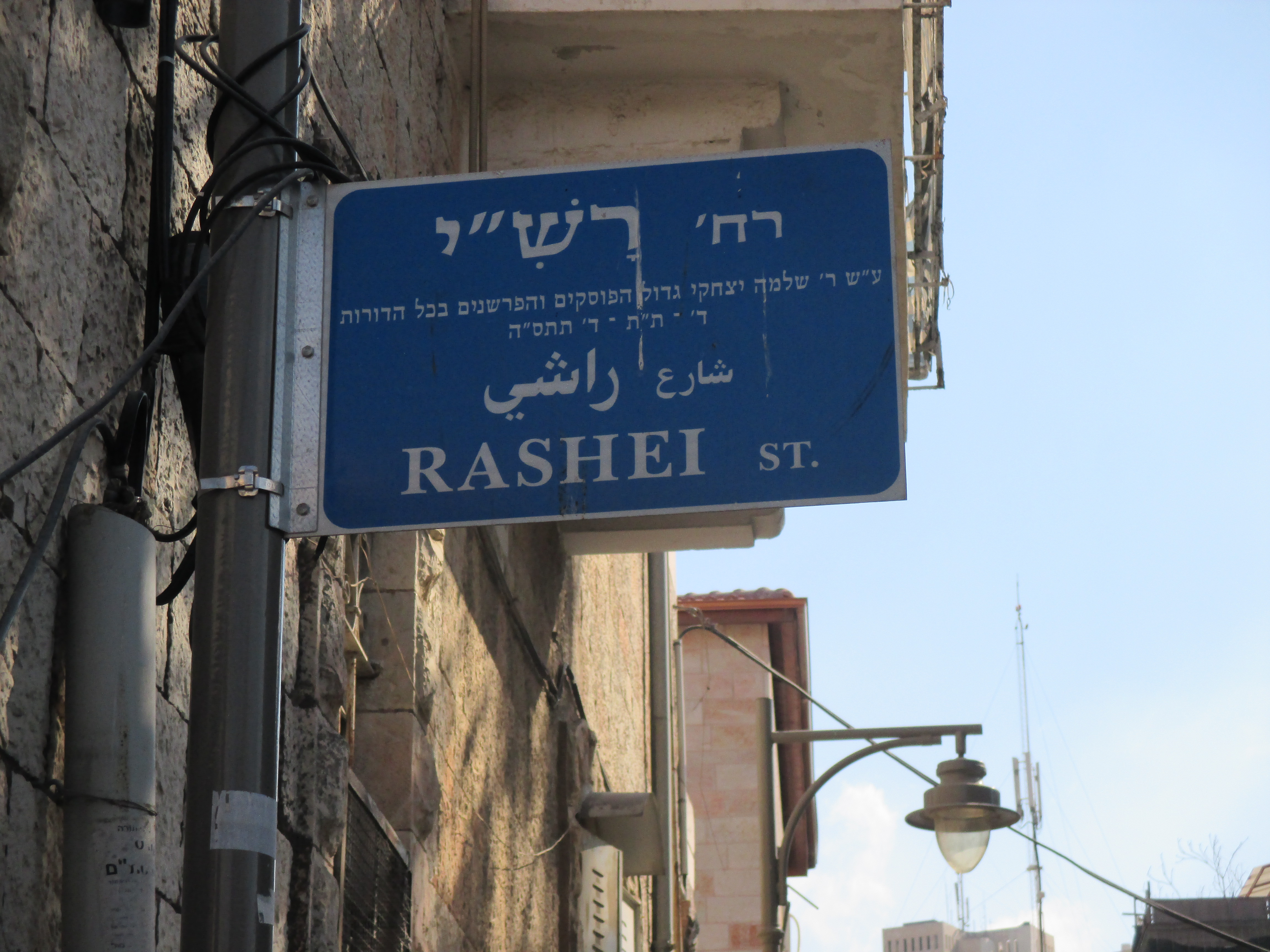 רחוב רש"י בירושלים